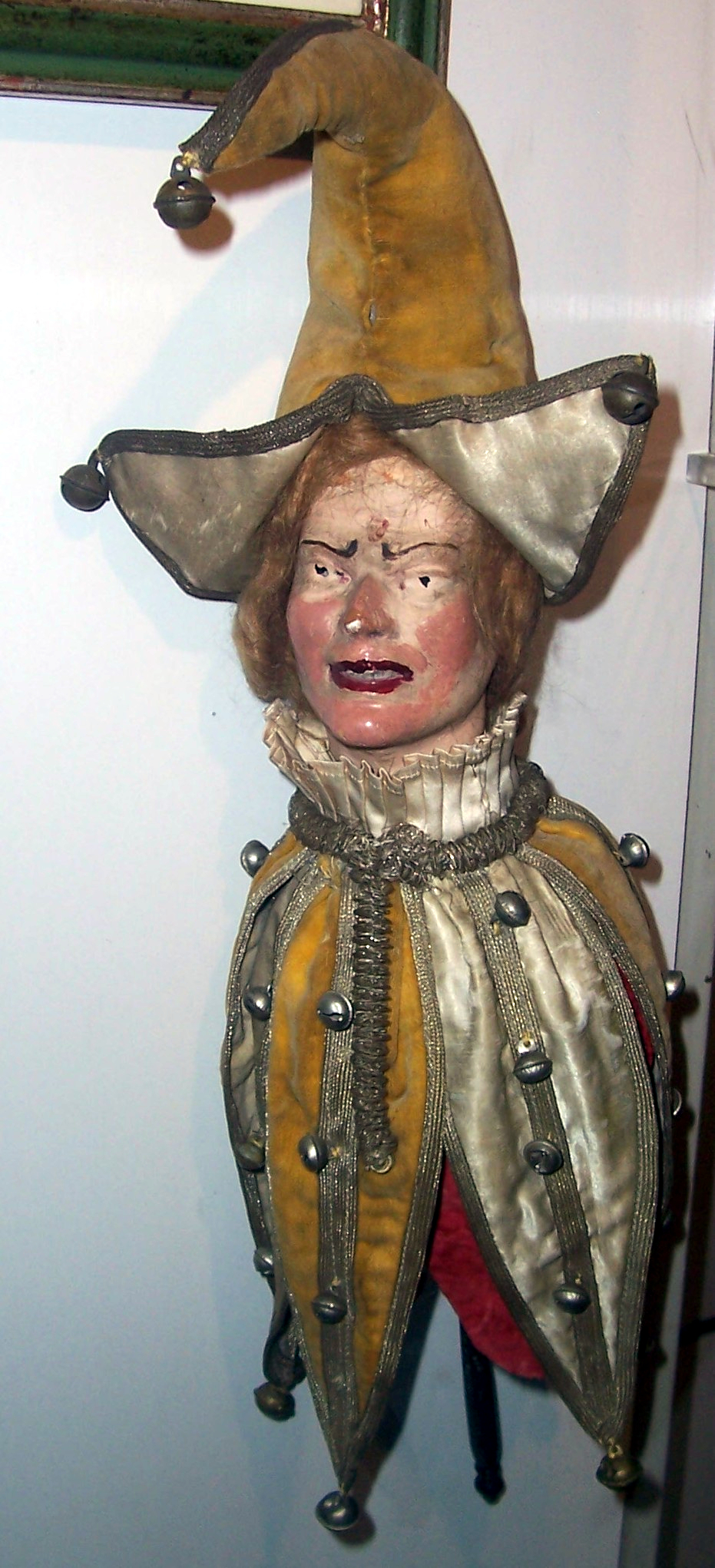 Marotte